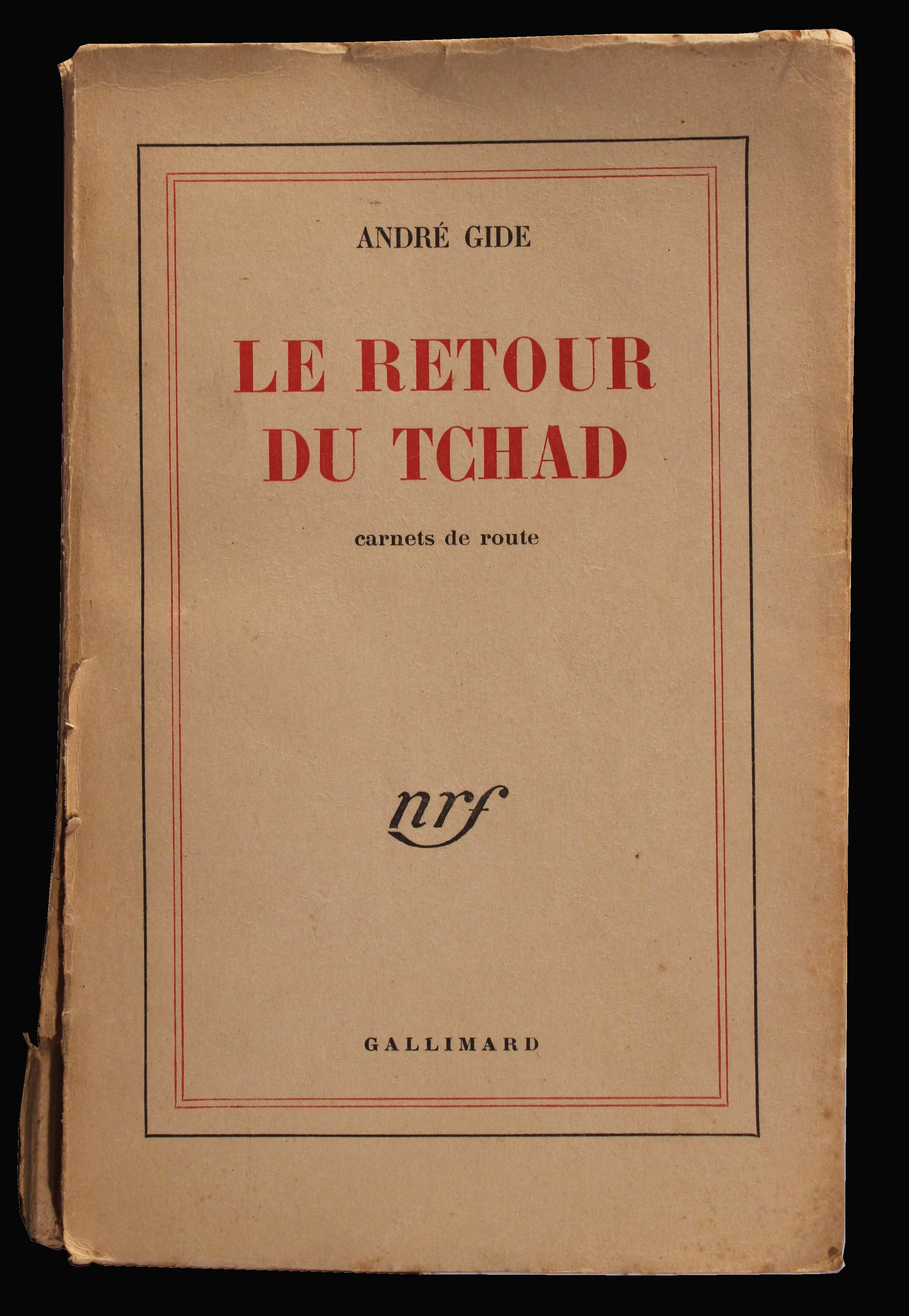 Première de couverture du carnet de voyage nommé "Retour du Tchad", écrit par André Gide et publié aux éditions Gallimard en 1928.